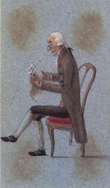 François DuPasquier (1735-1812).